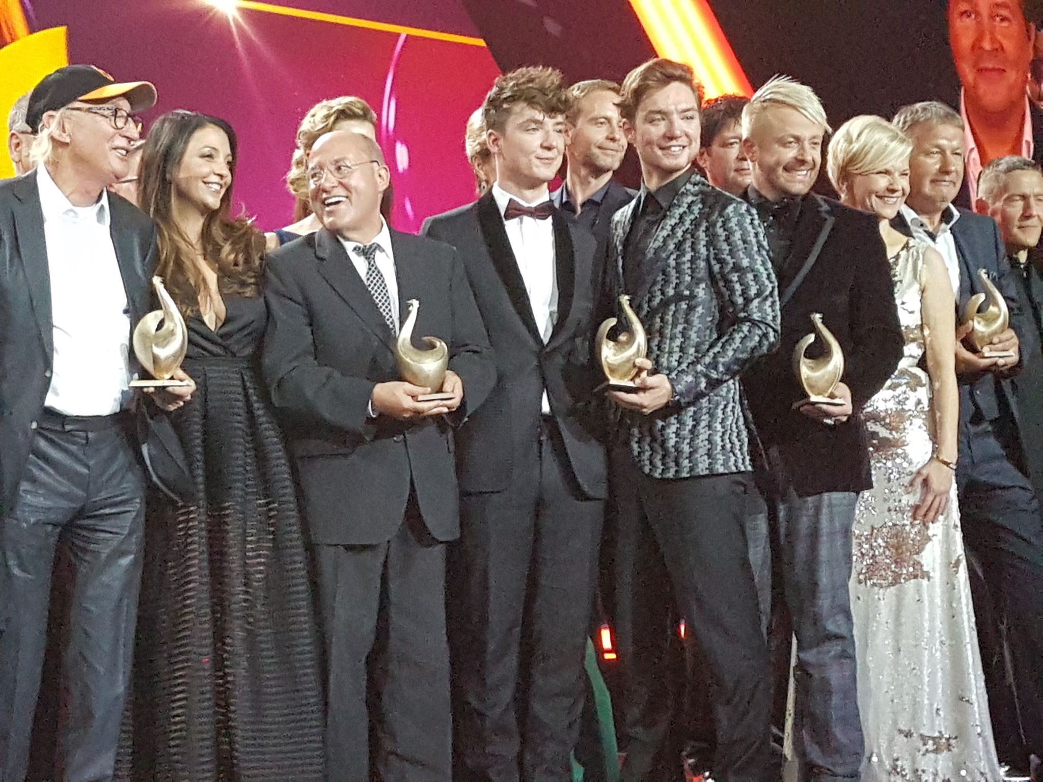 Gruppenbild Gewinner Goldene Henne 2018